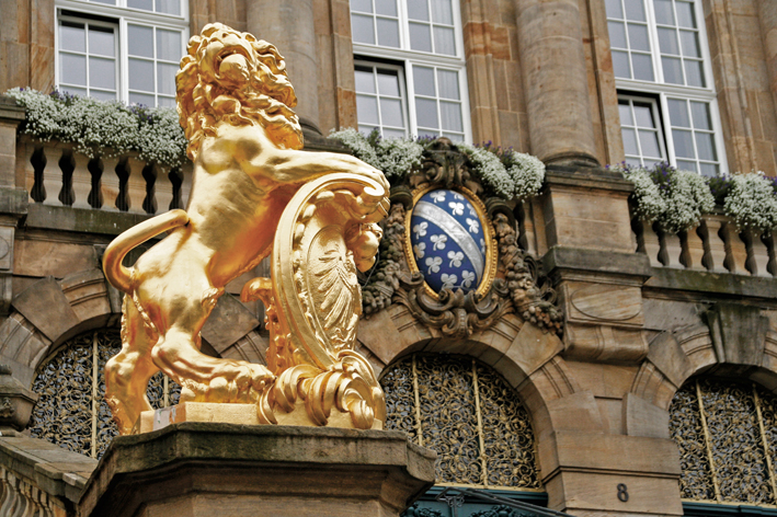 Hessenlöwe und das Stadtwappen an der Außentreppe des Kasseler Rathauses